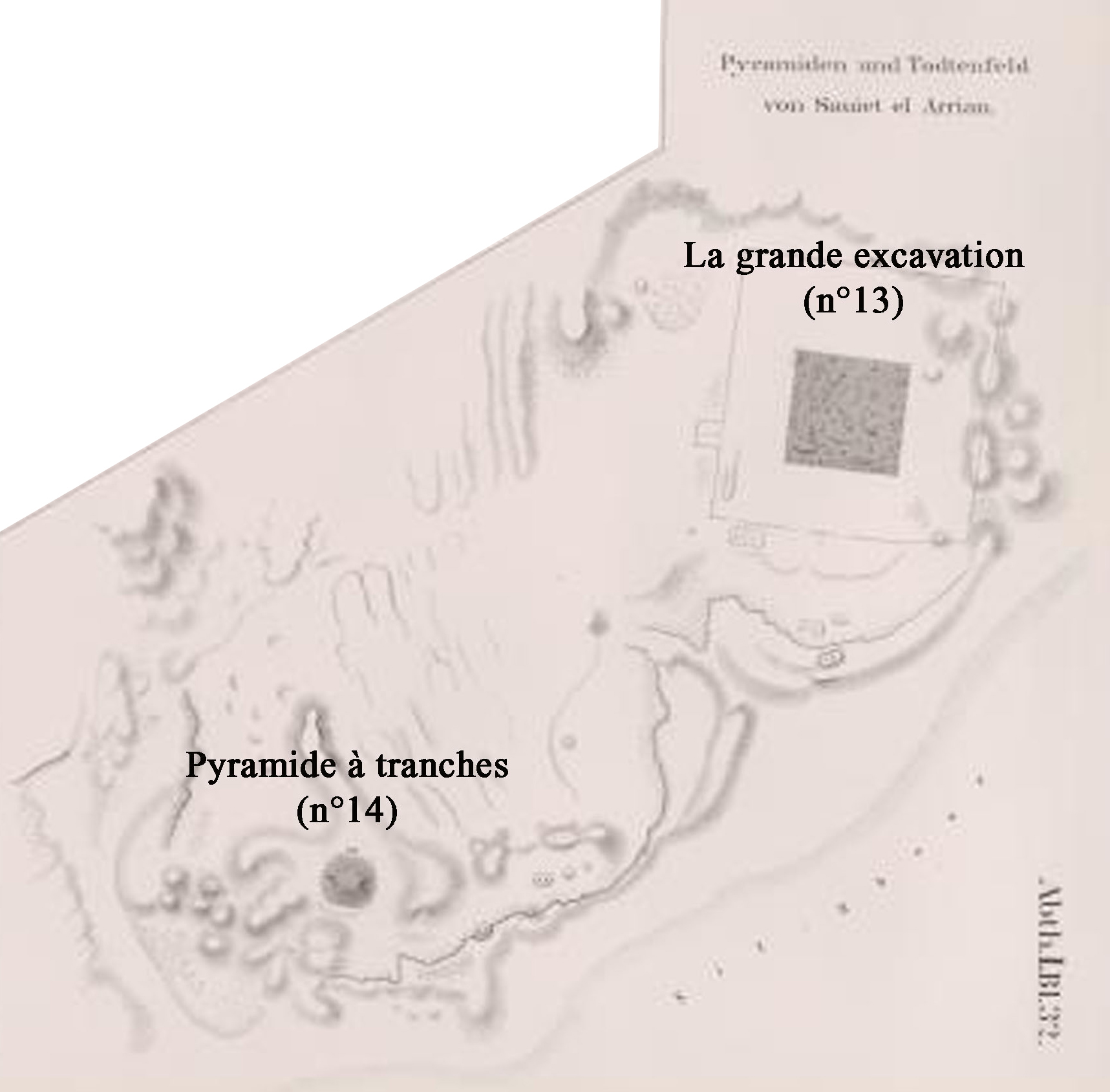 Carte d'Abousir, d'Abou Gorab et de Zaouiet el aryan (Karl Richard Lepsius)